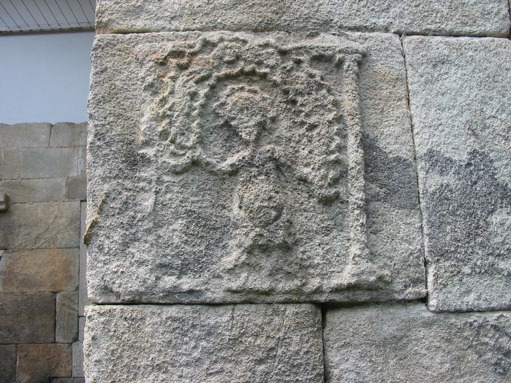 Santa Eulalia de Bóveda, Lugo, España. Relieve del exterior del atrio la cripta.